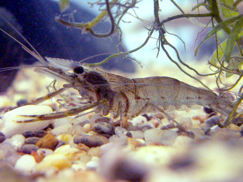 Macrobrachium formosense(ミナミテナガエビ)/Female(メス)